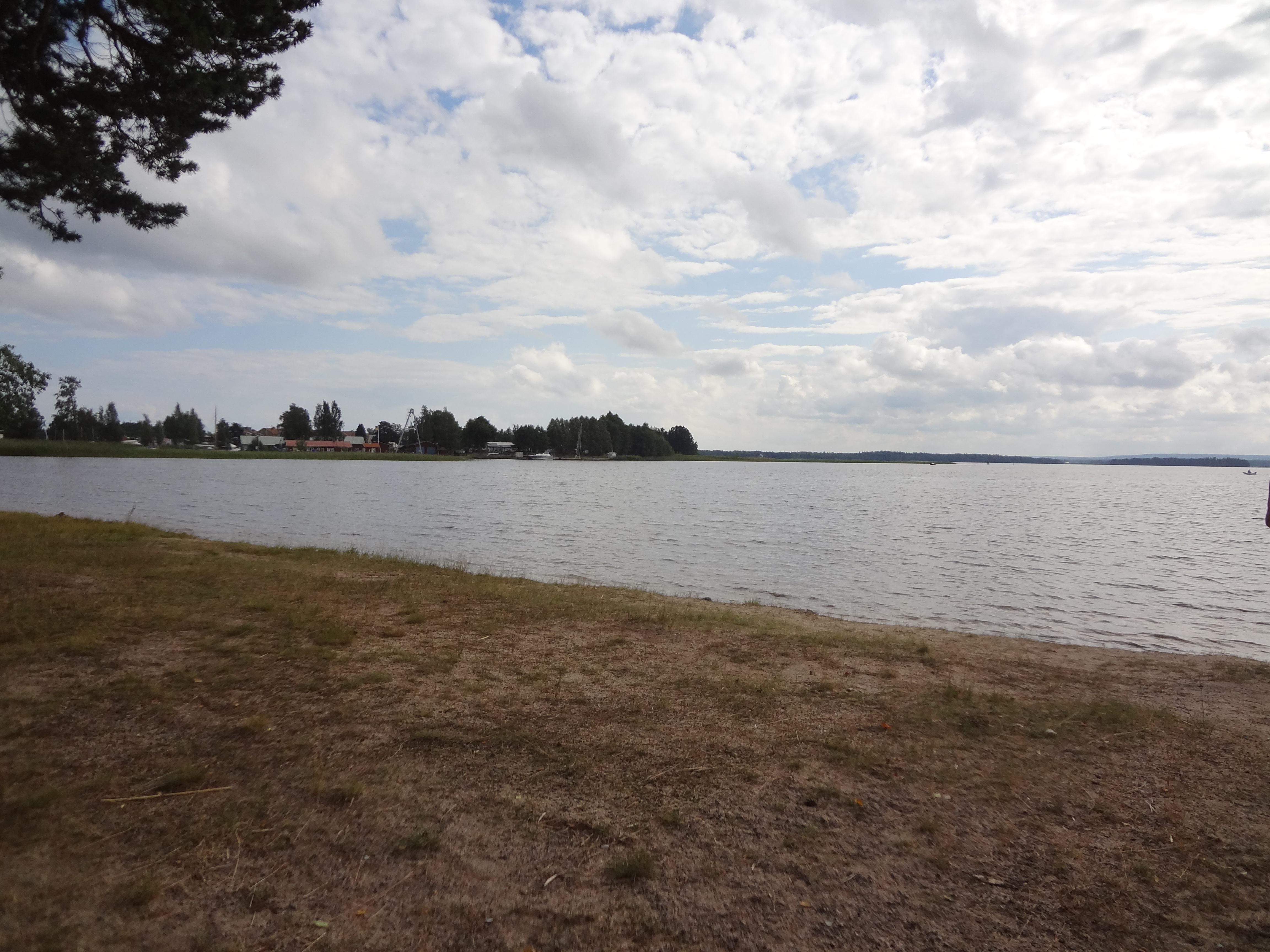 Bottensjön sedd från Karlsborg camping, husen som syns på fotot är där Göta Kanal passerar in i sjön.